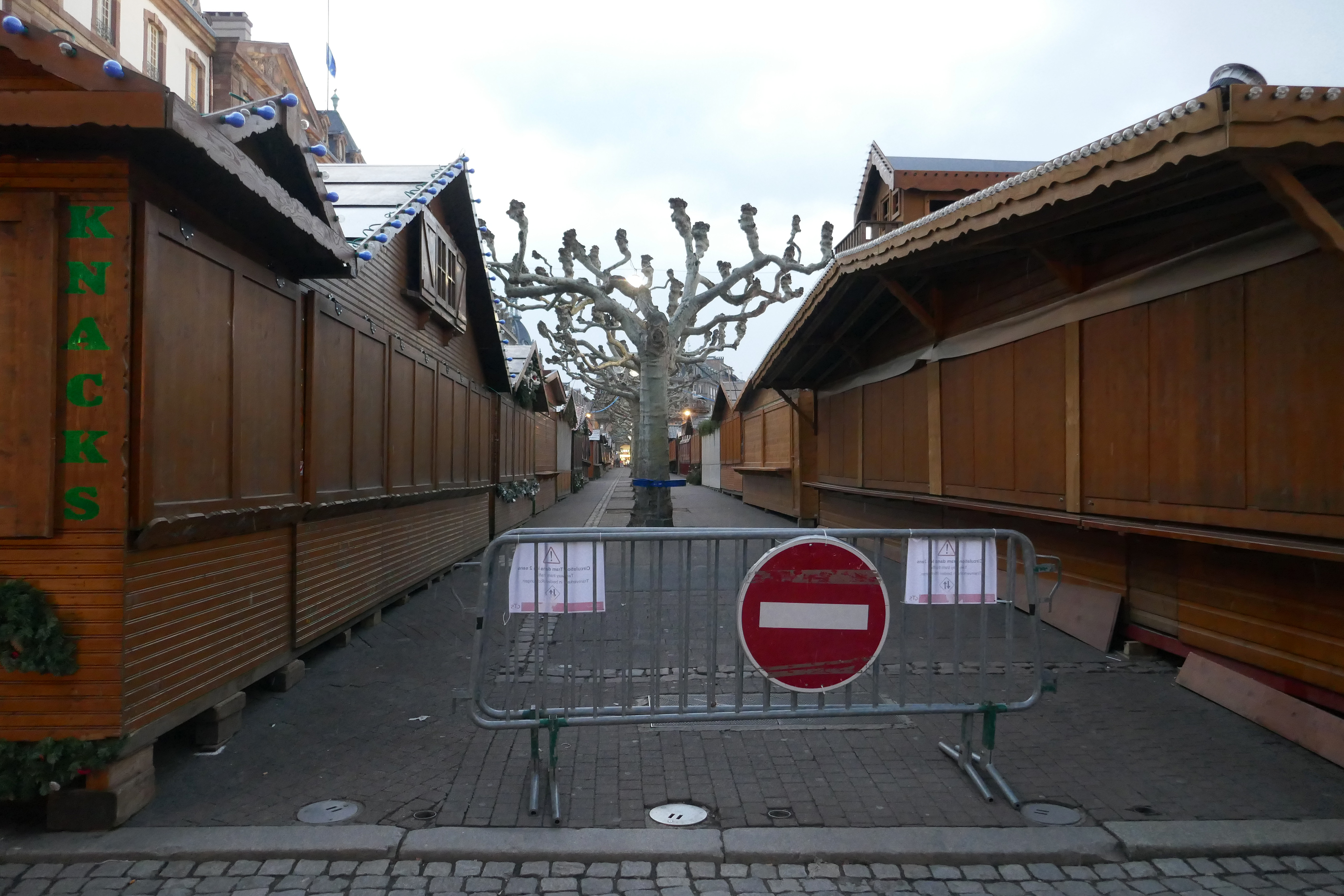 Place Broglie à Strasbourg. Marché de Noël fermé le jeudi 13 décembre 2018, à la suite de la fusillade du mardi 11 décembre.